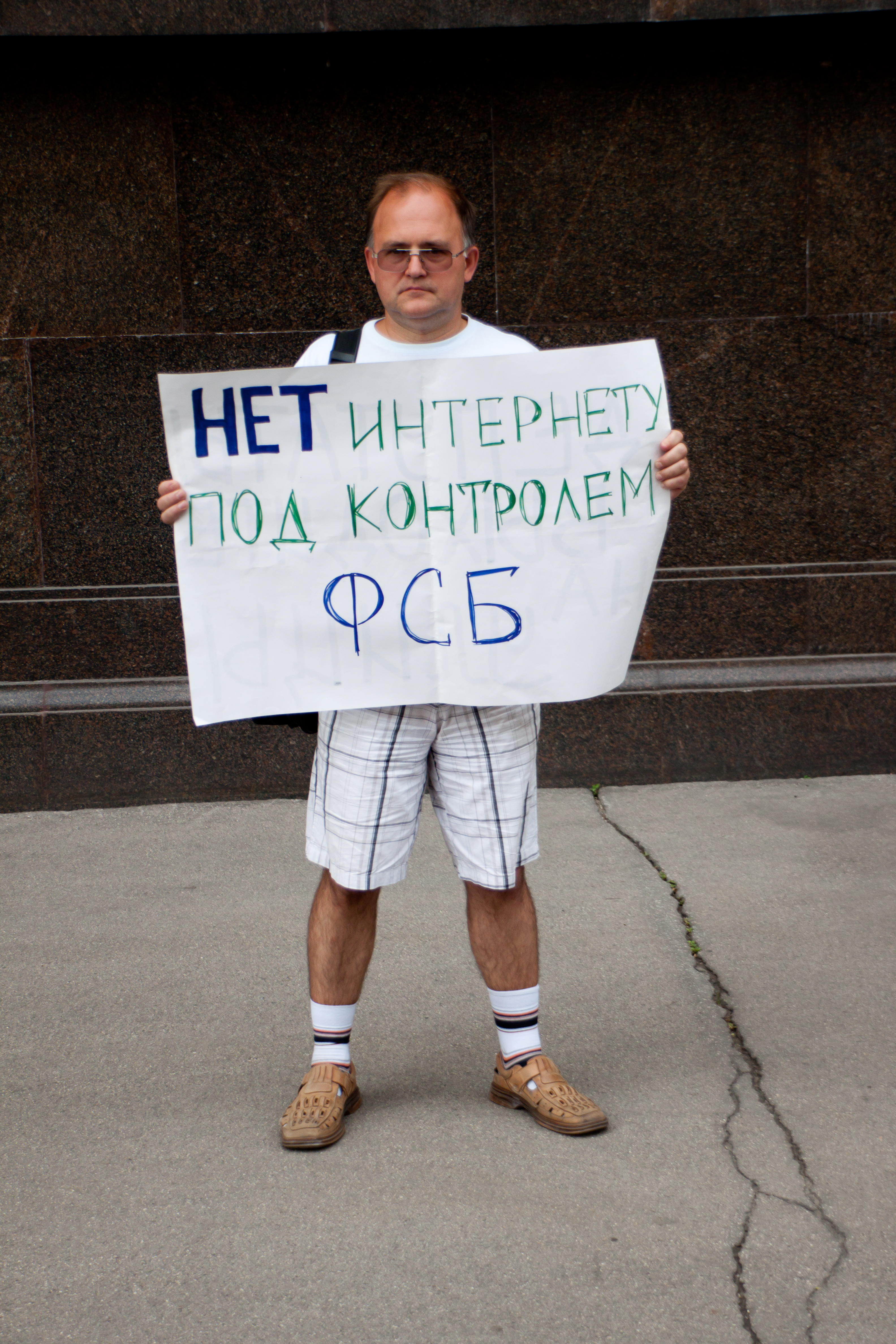 Одиночный пикет у здания Государственной думы в день принятия законопроекта № 89417-6